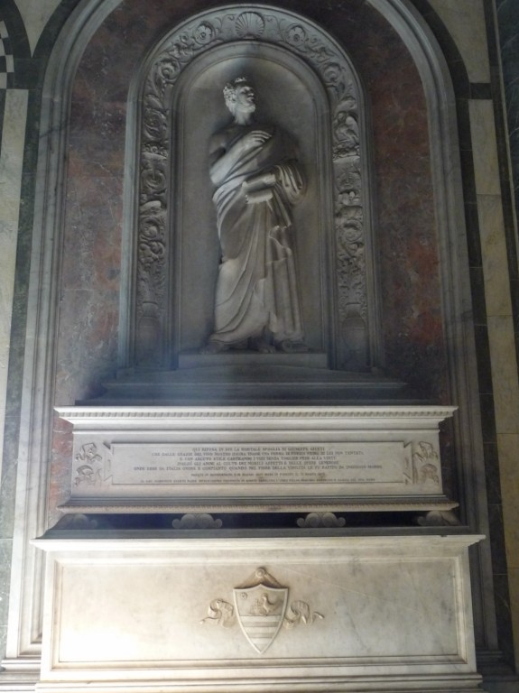 Tomba del poeta Giuseppe Giusti, si trova nella "Basilica di San Miniato al Monte" a Firenze